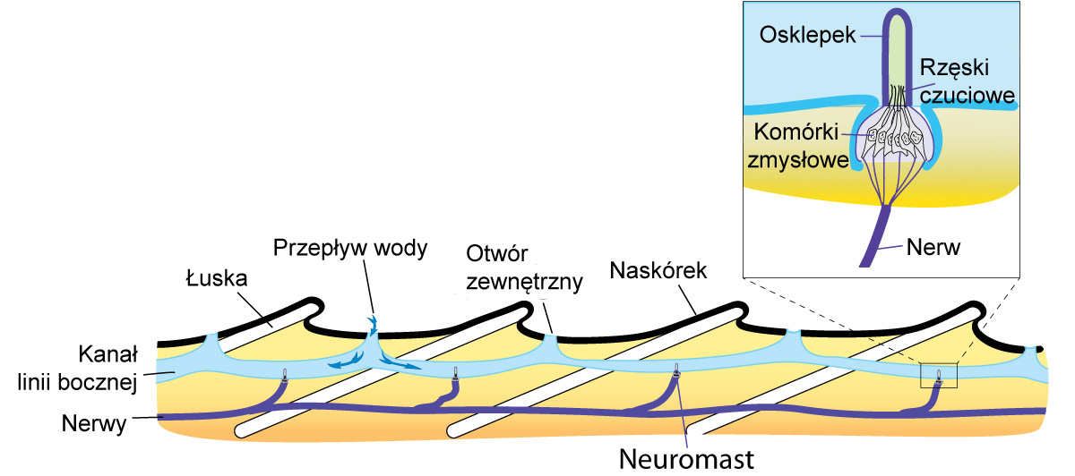 Narząd linii bocznej